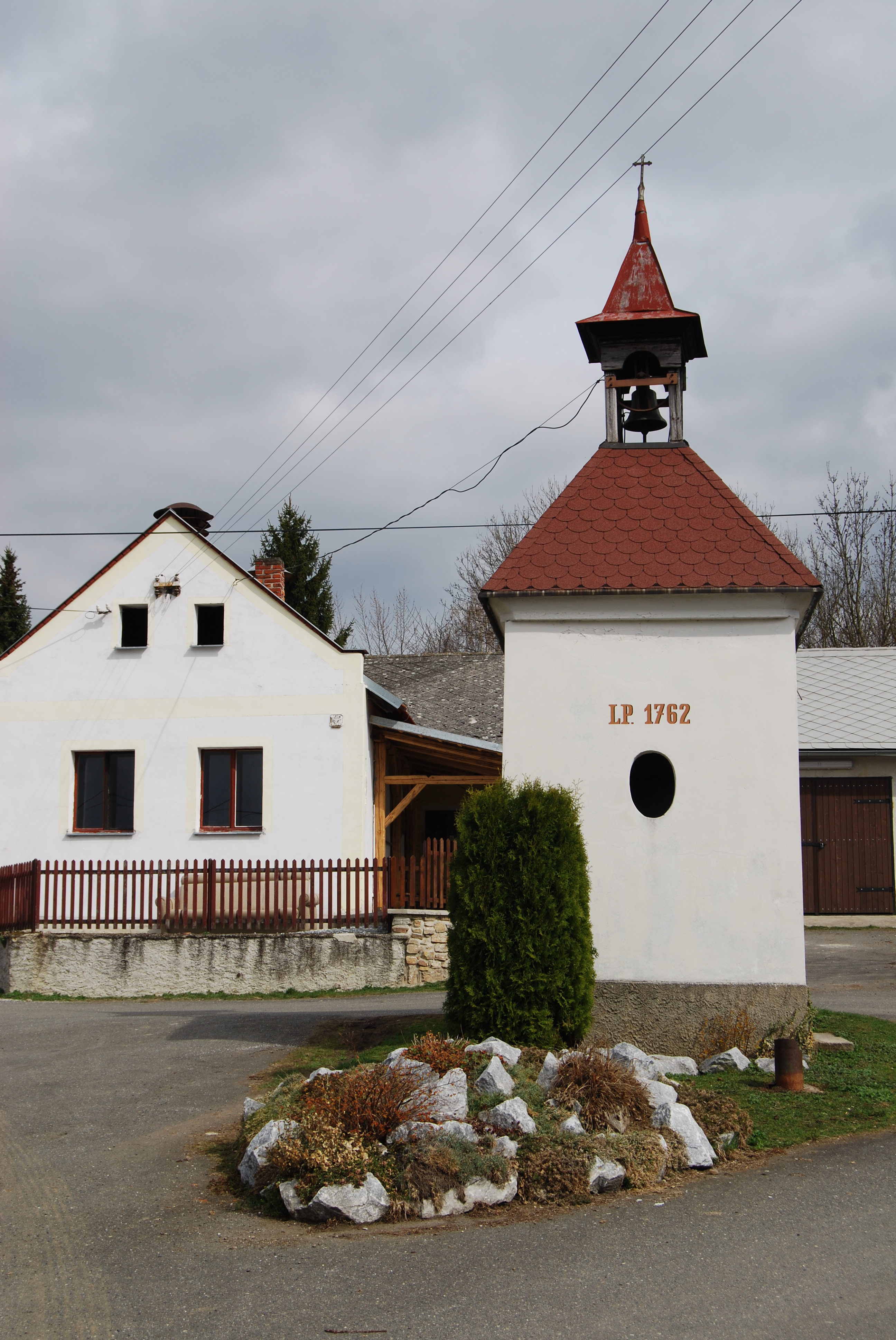 Návesní kaple z roku 1762. Týnčany je malá vesnice, část obce Petrovice v okrese Příbram. Česká republika.